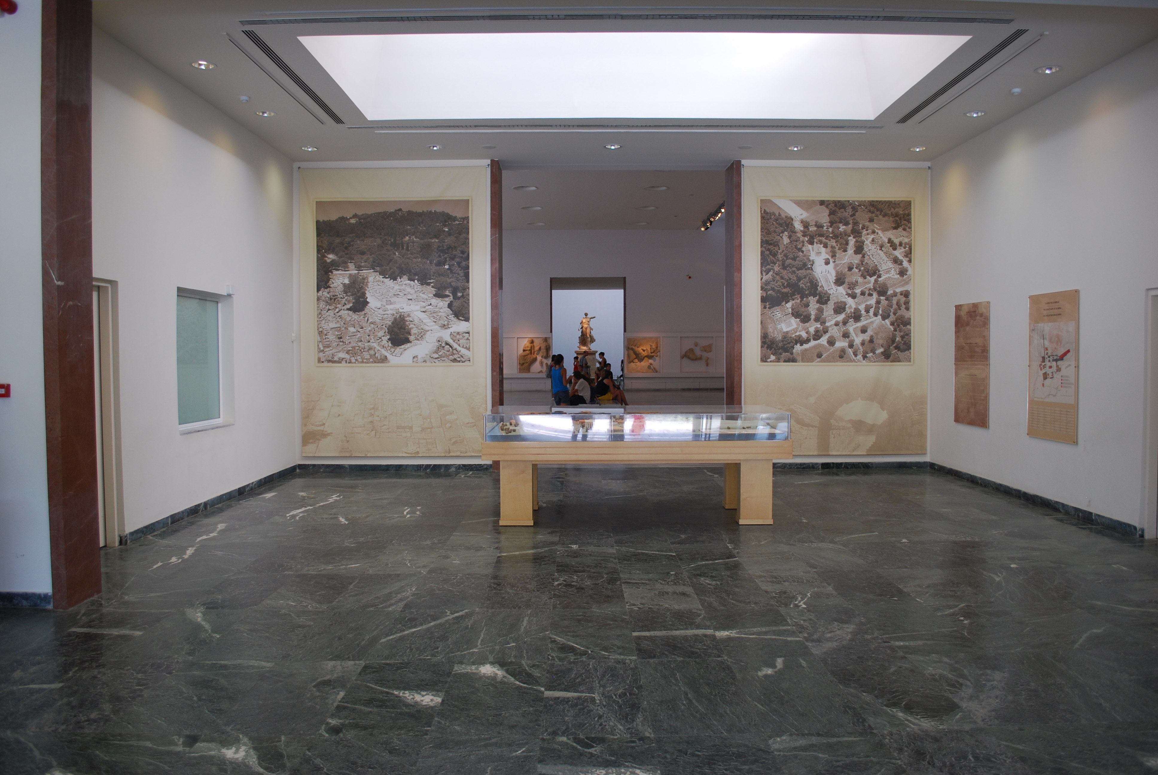 Musée Archéologique d'Olympie : hall d'accueil.